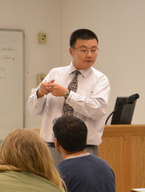 韩晗在纽约州大讲学。